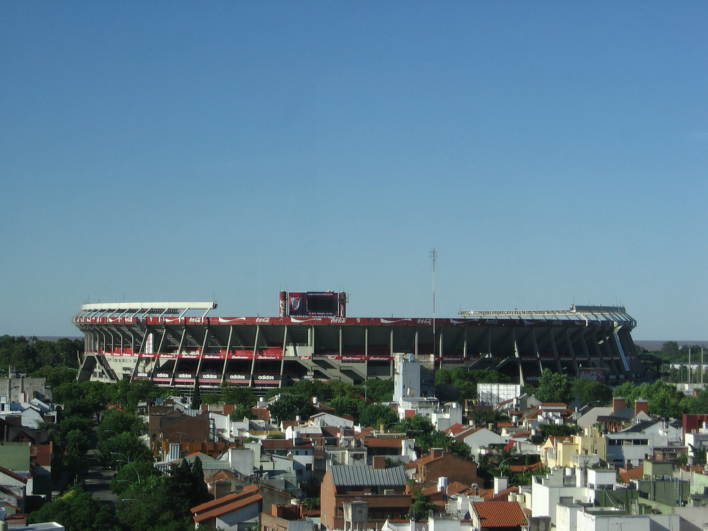 Cancha del Club Atlético River Plate.